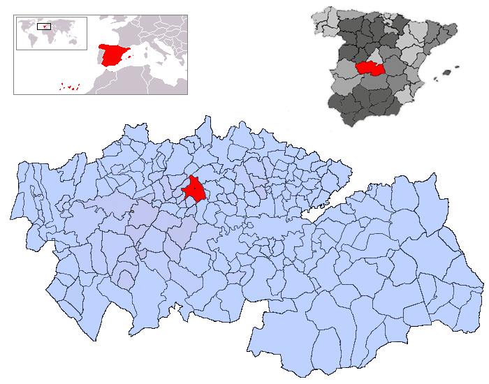 Santa Olalla en la provincia de Toledo